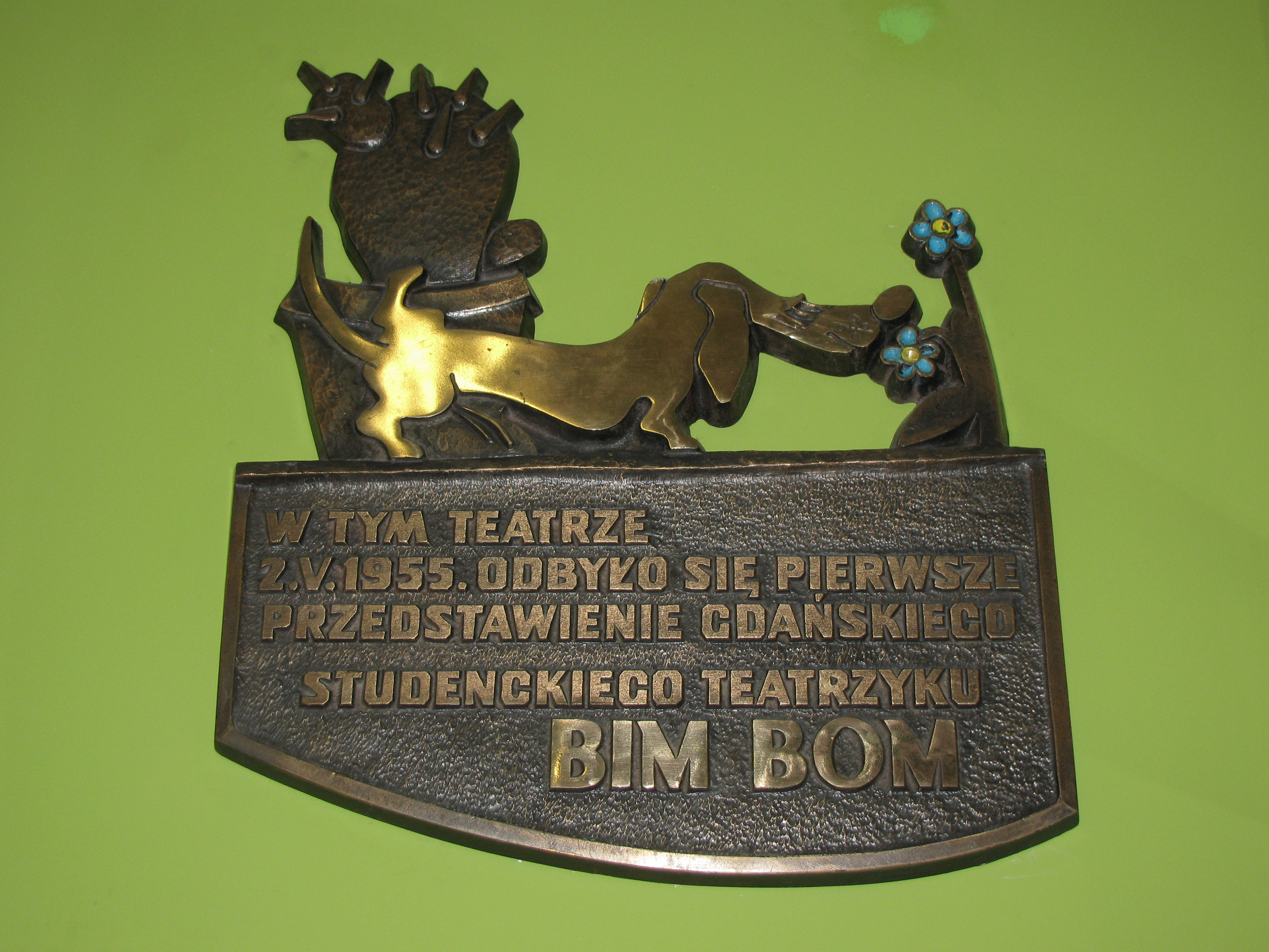 Miejski Teatr Miniatura w Gdańsku Wrzeszczu, tablica upamiętniająca gdański teatr studencki "Bim-Bom".